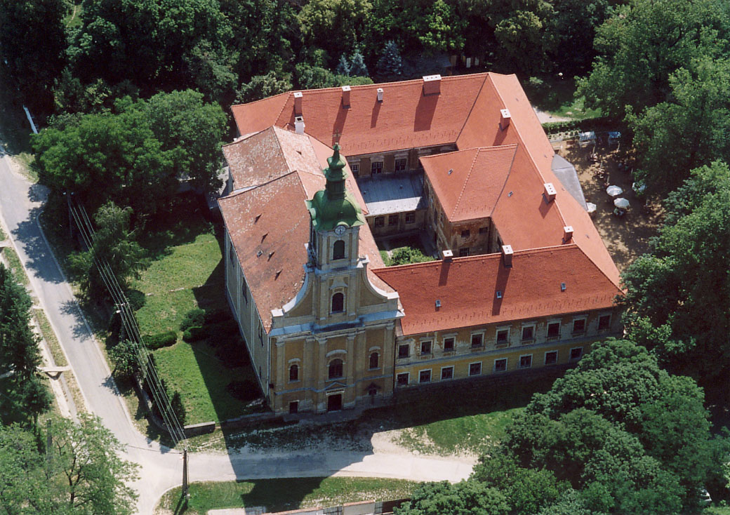 Zalaapáti, Hungary, aerialphotography. Szent Adorján és Szent Őrangyalok római katolikus templom